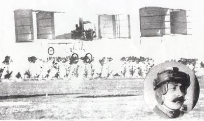 El primer vuelo en Iberoamérica